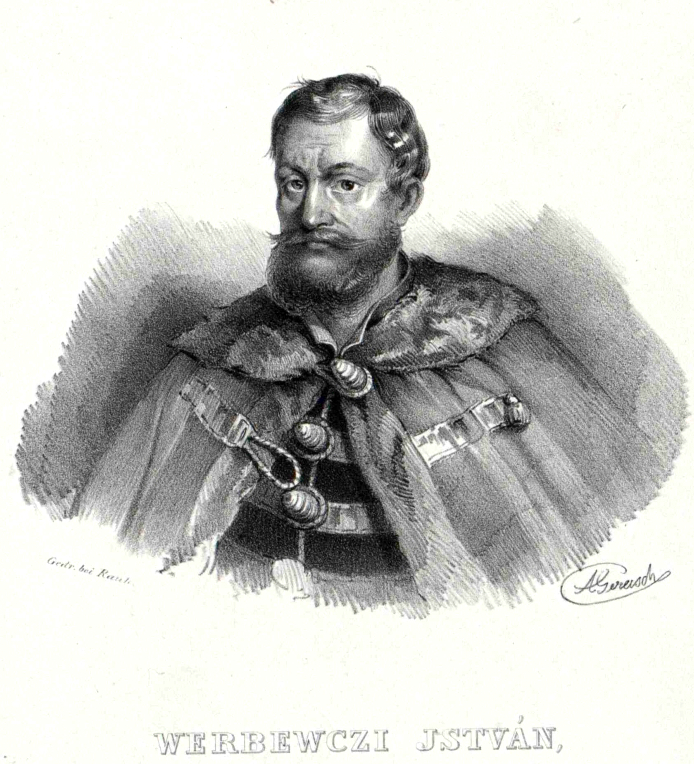 Werbőczy István (eltérő írásmódban Werbőczí, Verbőczy, Verbőczi), (Verbőc (?), 1458 – Buda, 1541. október 13.) jogtudós, királyi ítélőmester, királyi személynök, majd Magyarország nádora.